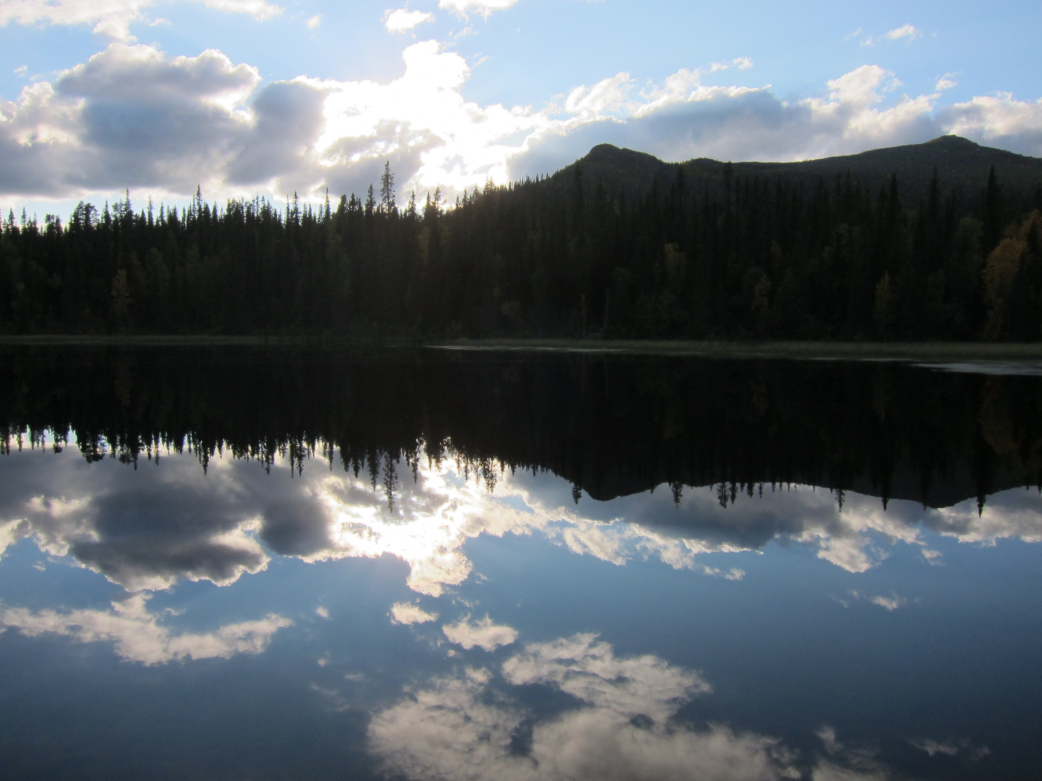 Sjön Sjabtjakjaure vid Pårte fjällstuga.